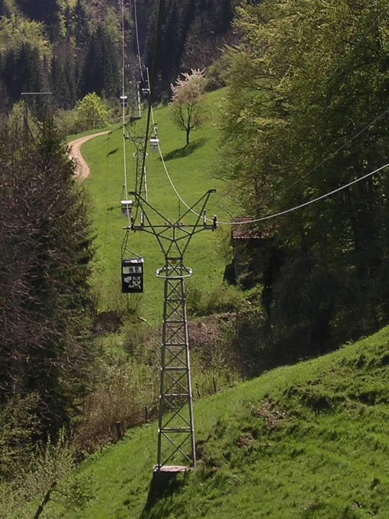 Kuppelbare Gondelbahn in Wasserfallen, Schweiz, erbaut 1956 von Gerhard Müller - die Bahn ist inzwischen umgebaut.